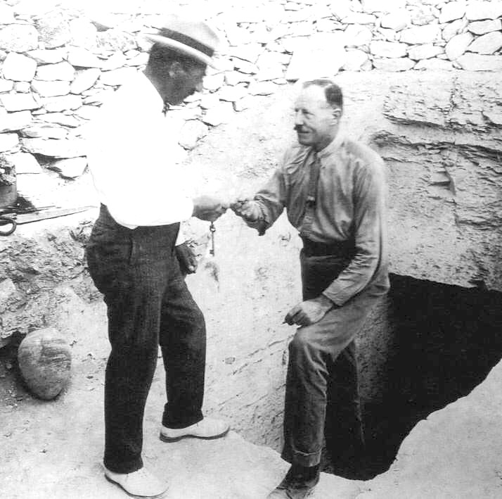 Lord Carnavon auf den Stufen zum Grab Tutanchamun und Howard Carter (links) HOWARD CARTER & Arthur MACE, 104 Abbildungen nach photographischen Aufnahmen von Harry Burton (1879–1940)